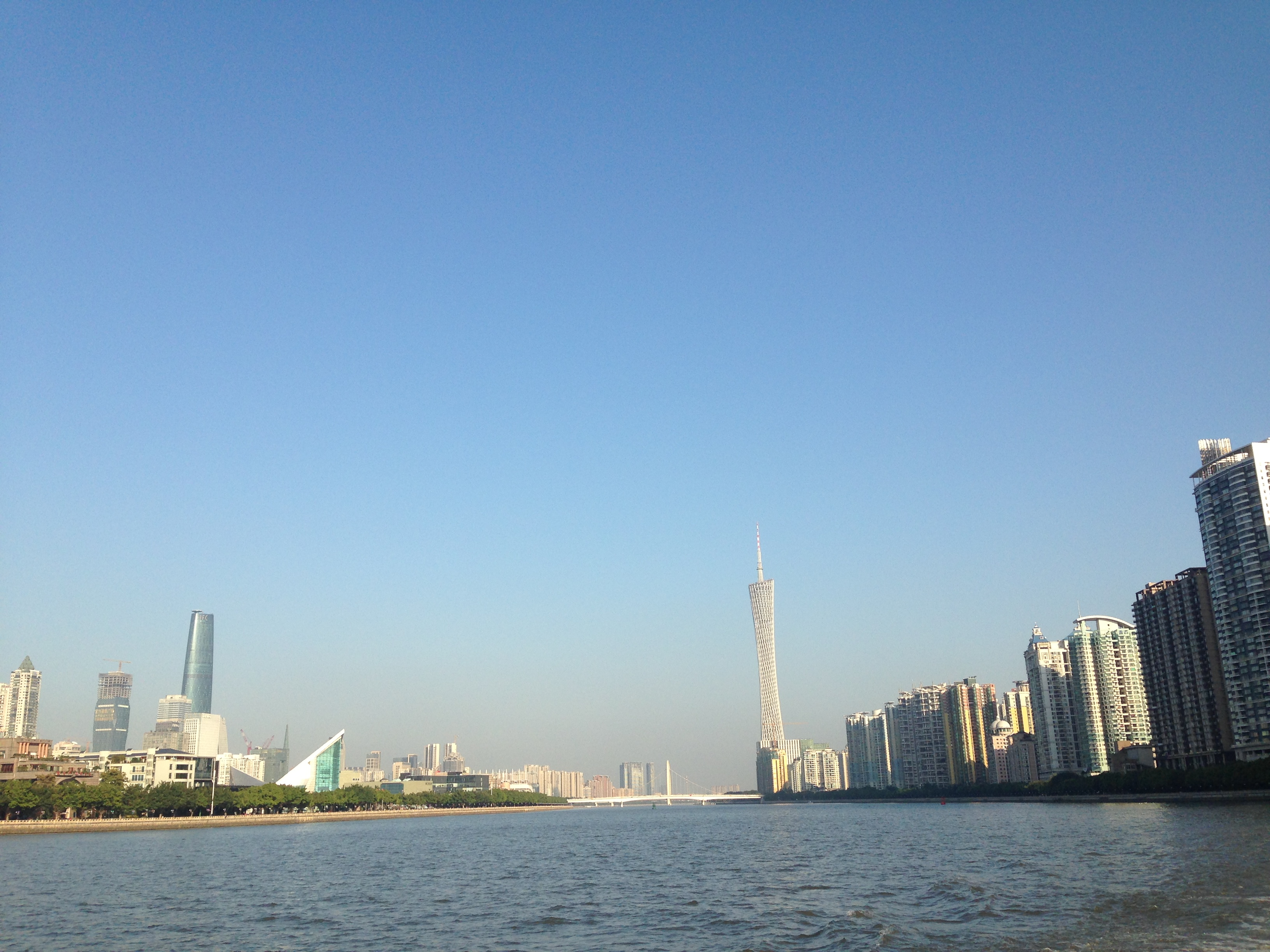 二沙島以南的珠江，左側島上有星海音樂廳，遠處可見廣州塔。